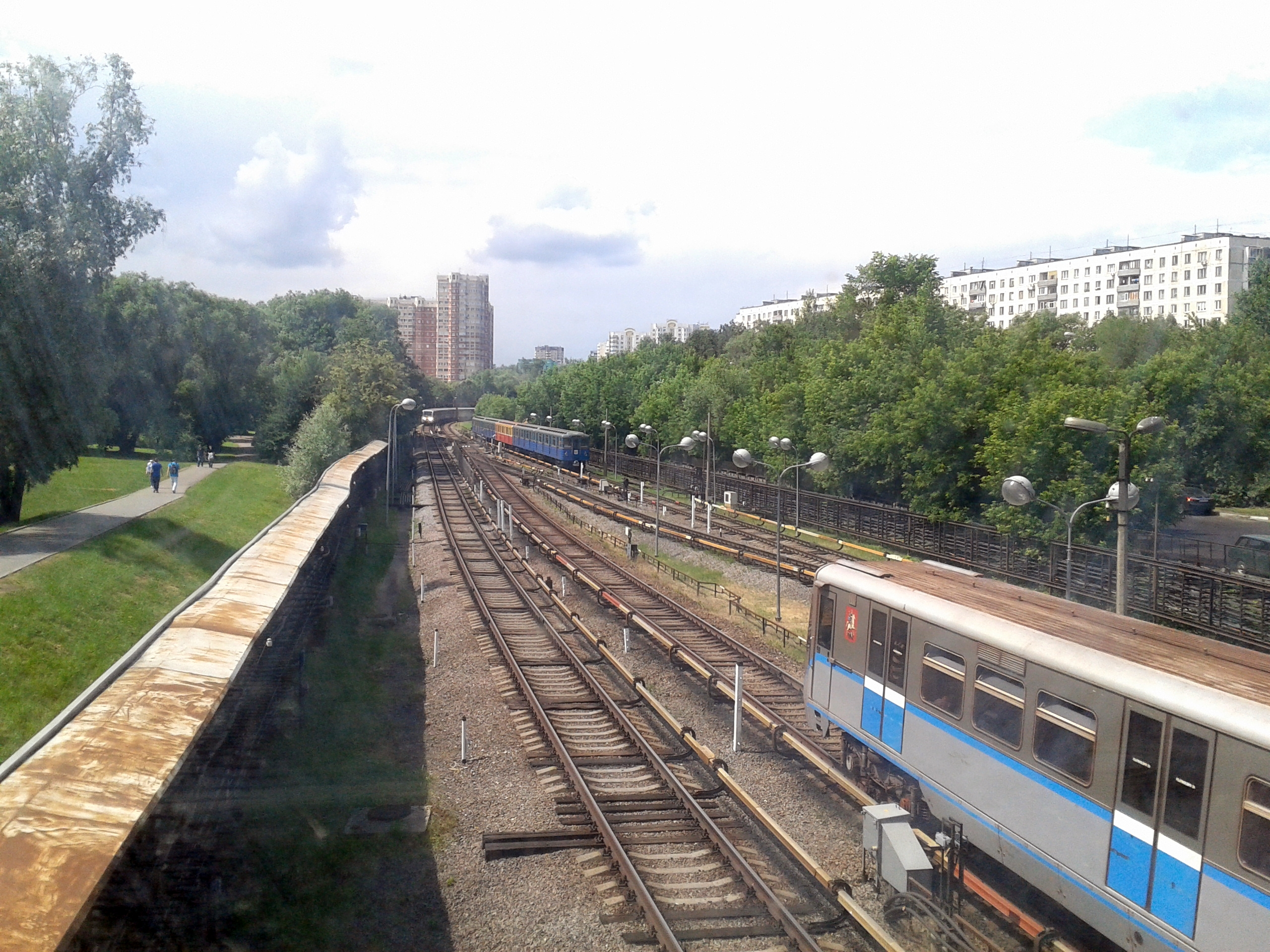 Железнодорожная развязка около м. Кунцевская Московского метрополитена.